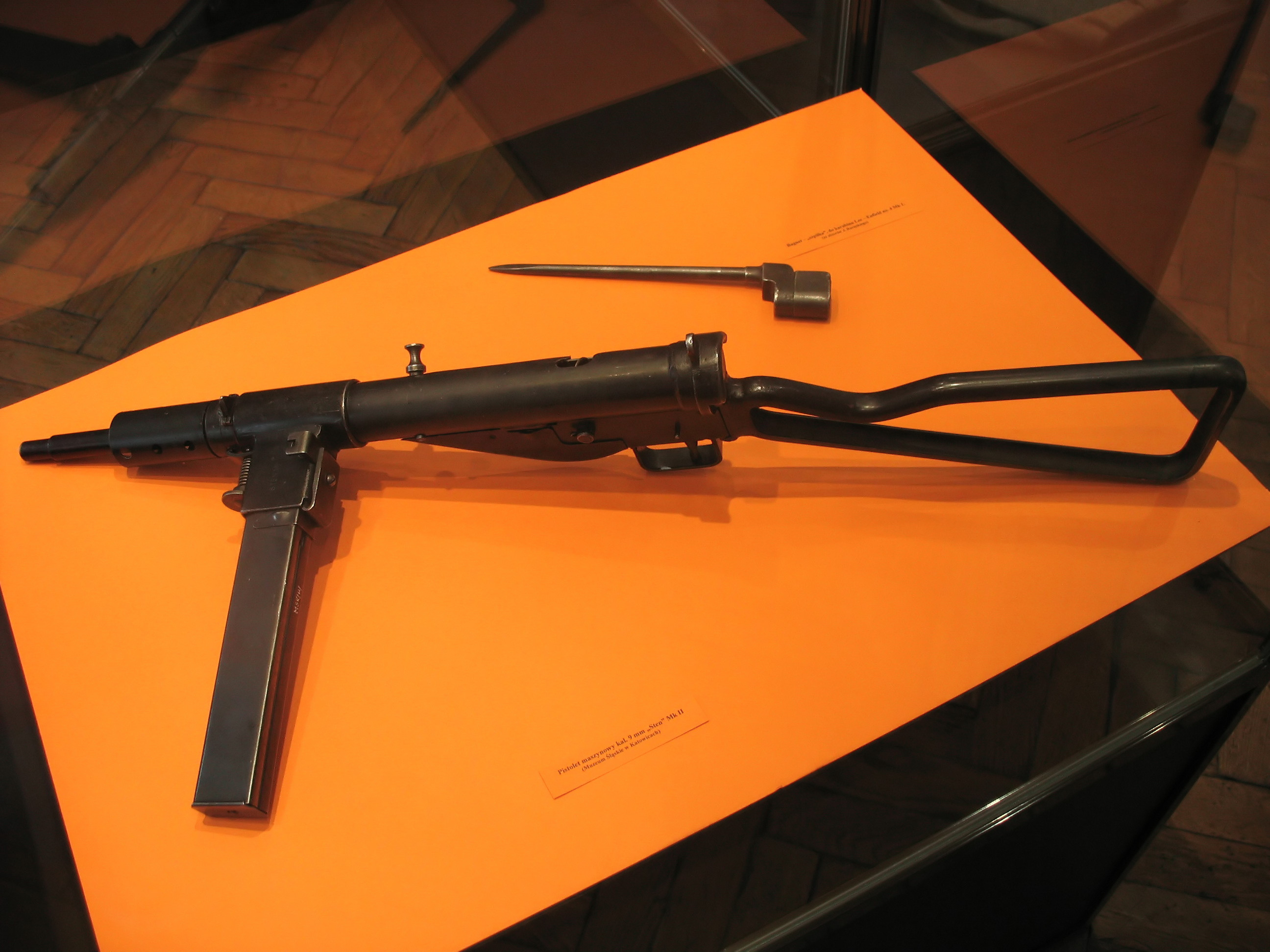 Pistolet maszynowy Sten Mk II. Obok pm lezy bagnet od karabinu No. 4 Mk I. Zdjęcie zrobione w Muzeum Górnictwa Węglowego, wystawa czasowa "Żołnierze wolności. I Dywizja Pancerna".